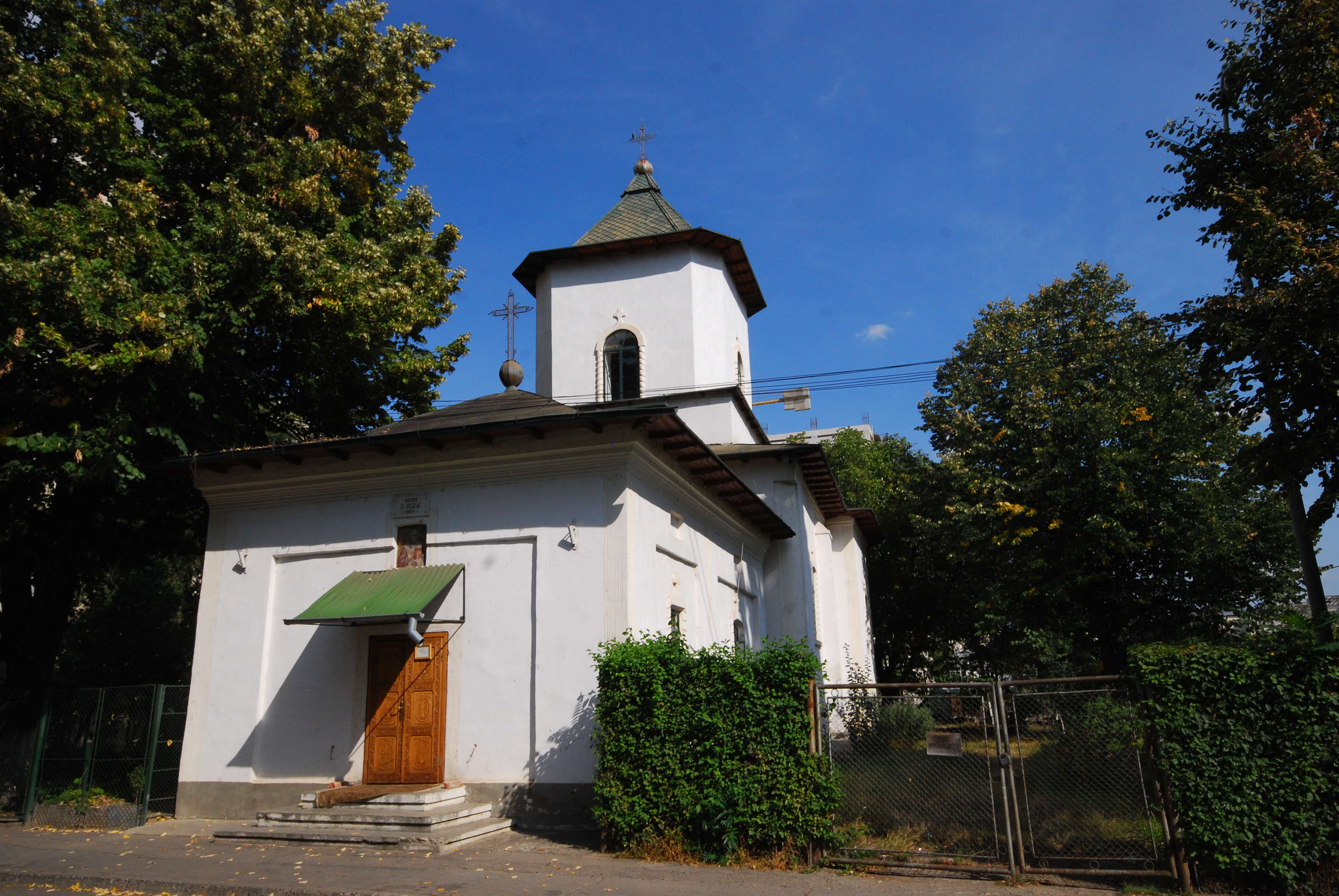 Biserica "Sf. Nicolae" Ciurchi